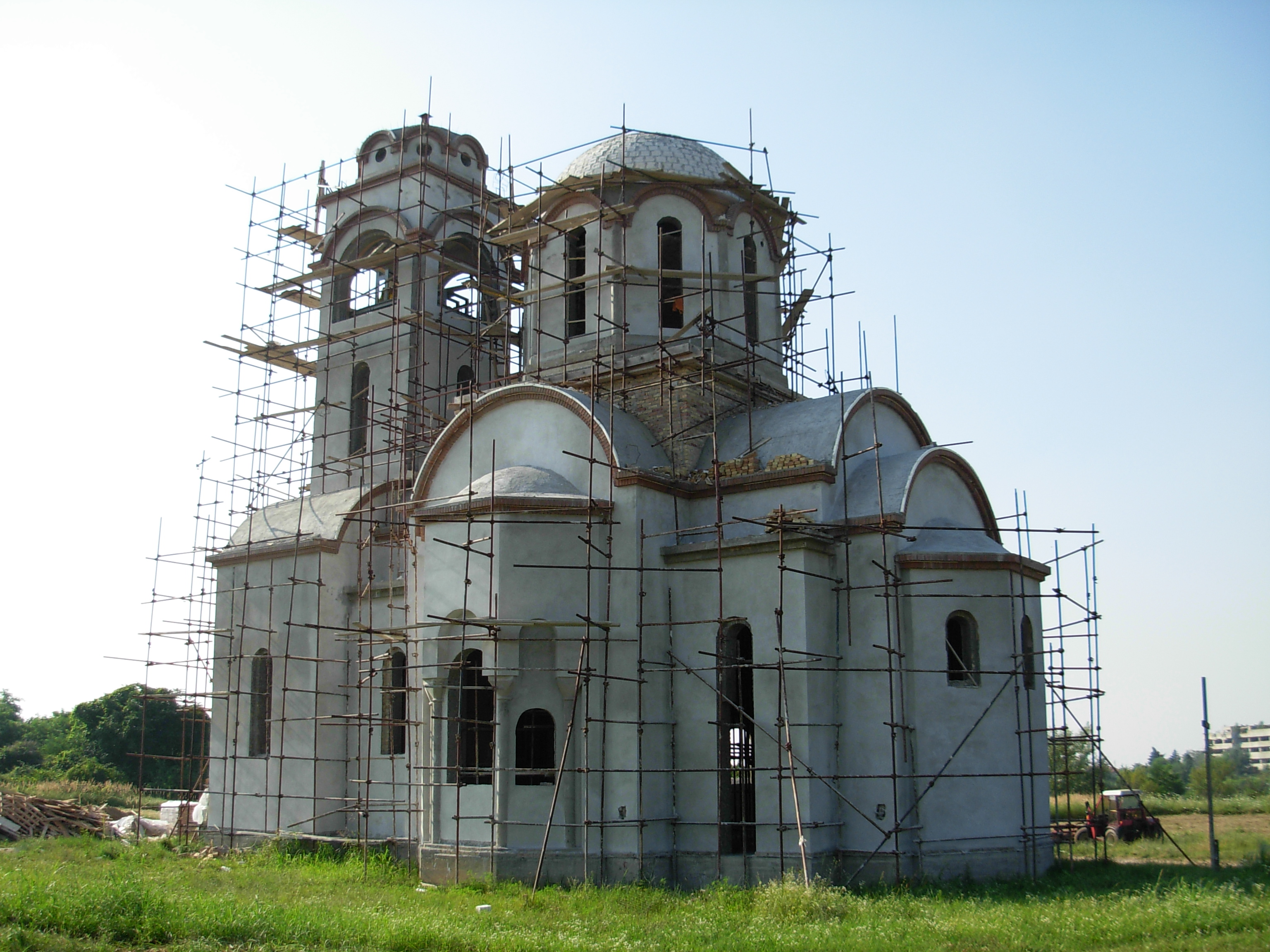 Crkva na Mišeluku u fazi izgradnje.